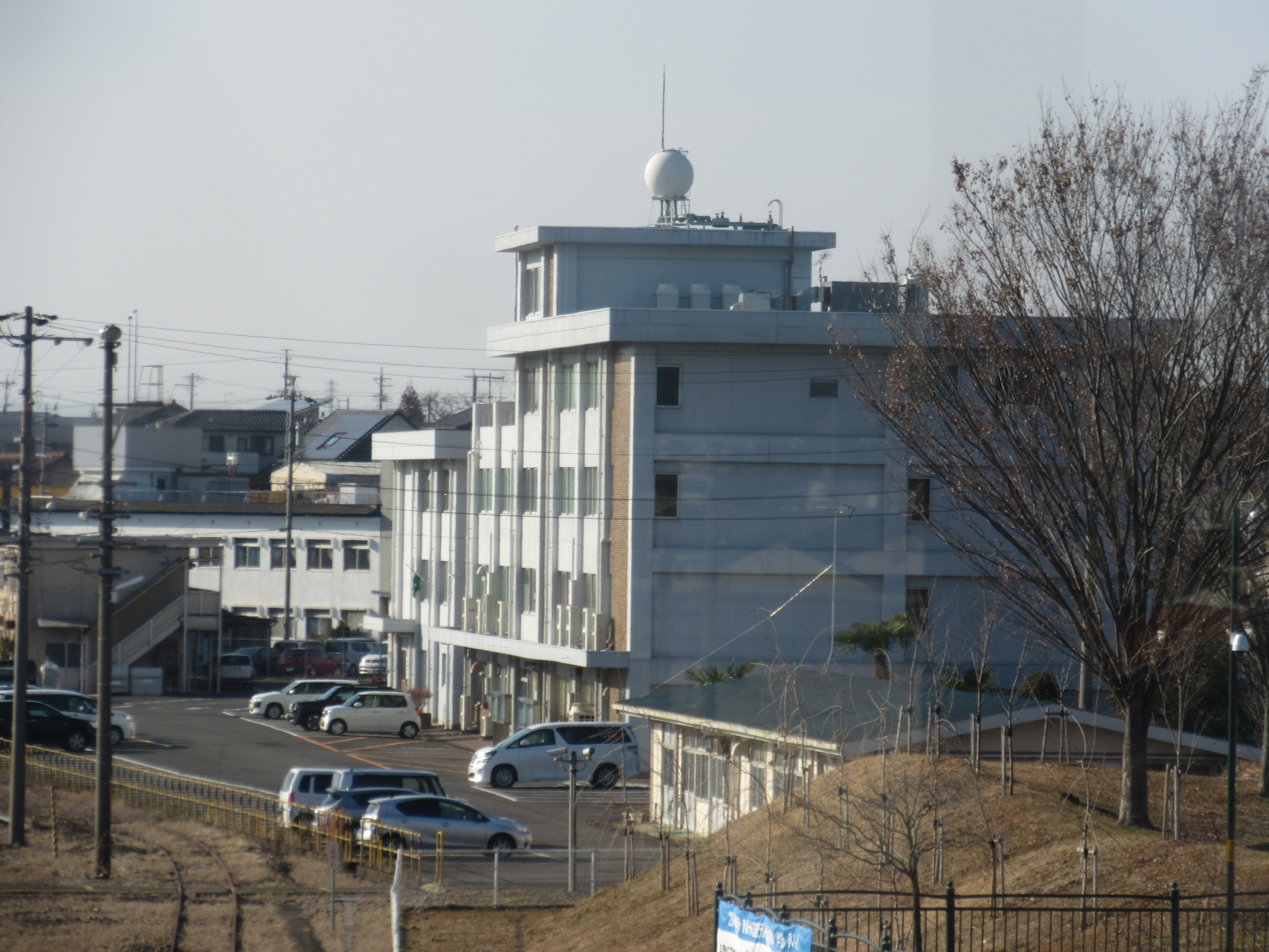 美濃太田運輸区 Canon PowerShot SX600 HS